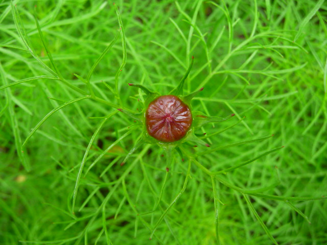 Knospe des Schmuckkörbchens (Cosmos bipinnatus)